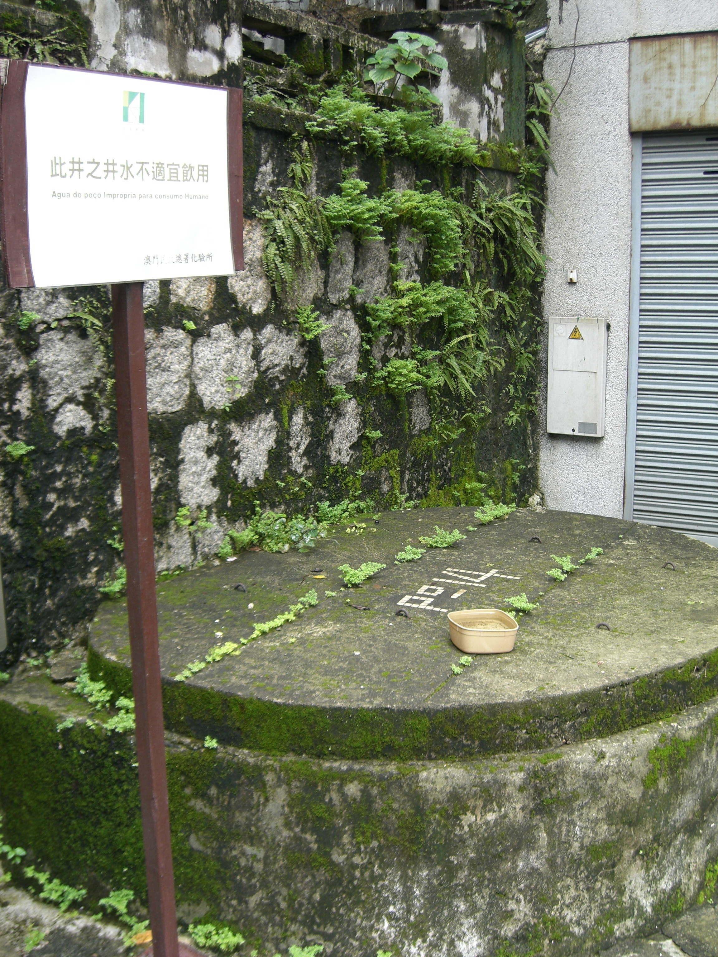 Pátio do Espinho